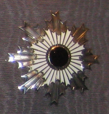 Знак ордена восходящего солнца. Начало 20 века